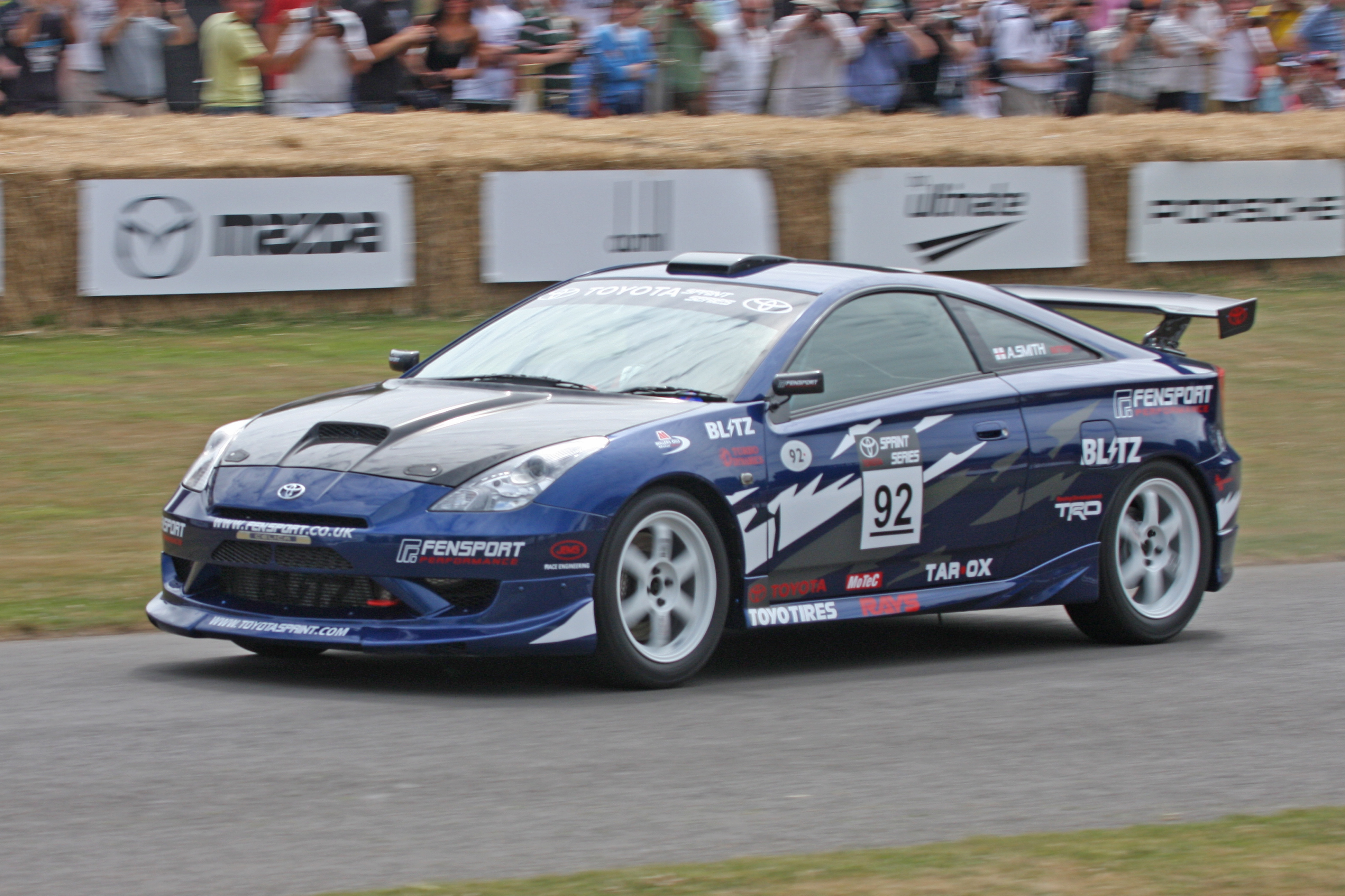 2001 Toyota Celica